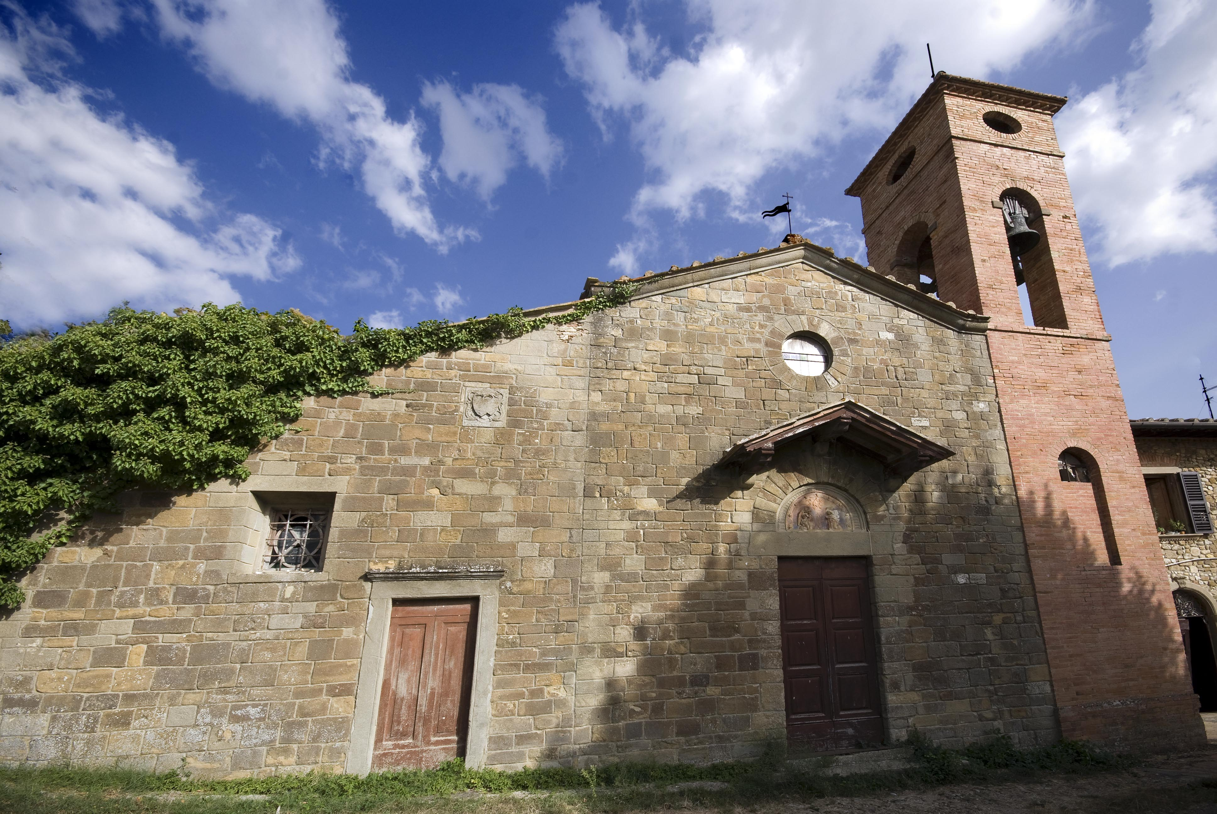 chiesa di san Lorenzo a vigliano